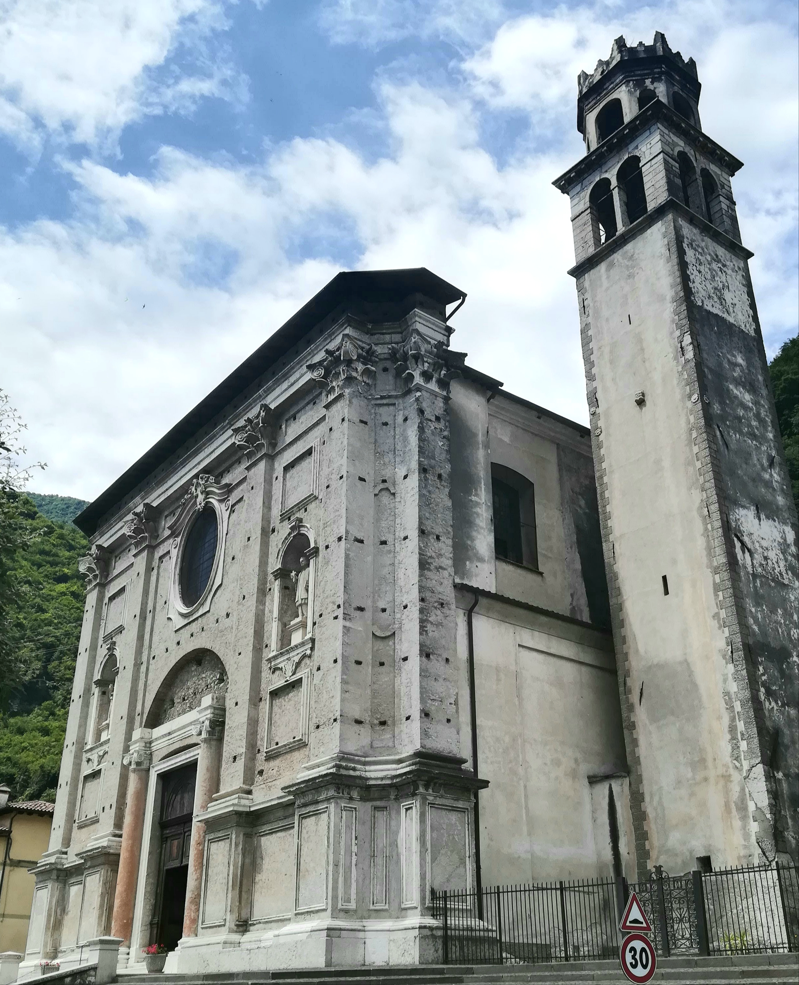 La chiesa e il campanile di Valstagna